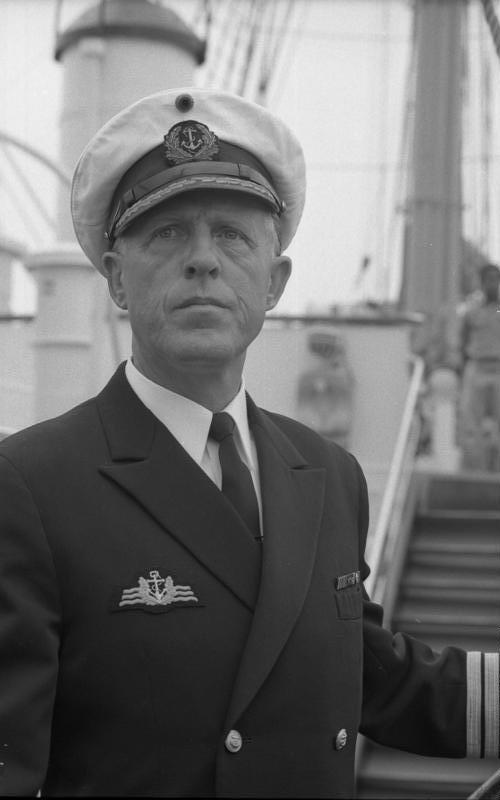 Das Segelschulschiff der Bundesmarine "Gorch Fock" verlässt zur 48/49 Auslandsausbildung den Kieler Hafen